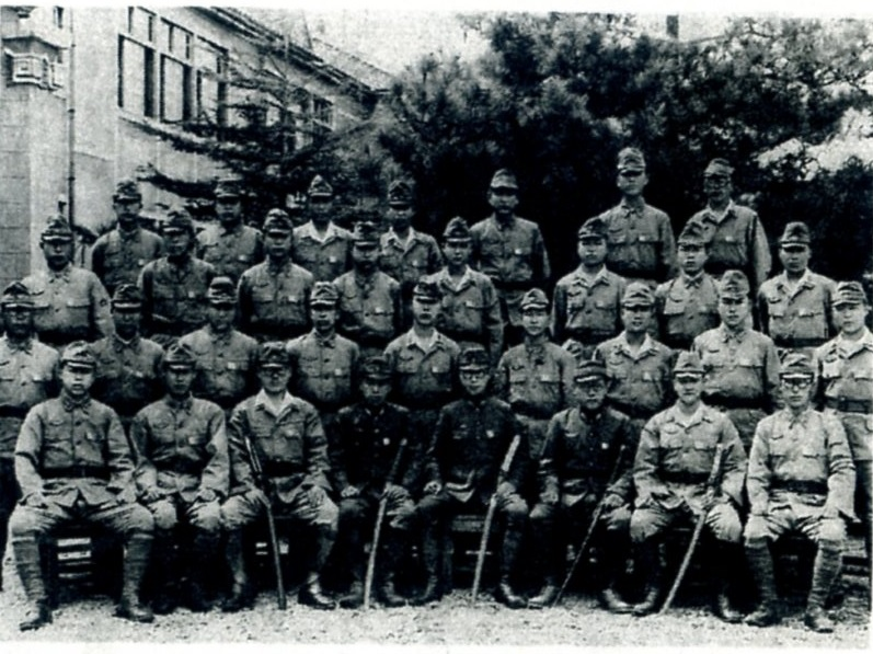 東部第1903部隊調布隊。射北中学校において昭和20年8月撮影。